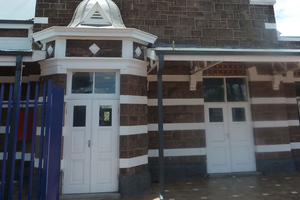 Die ingang na die stasiegebou